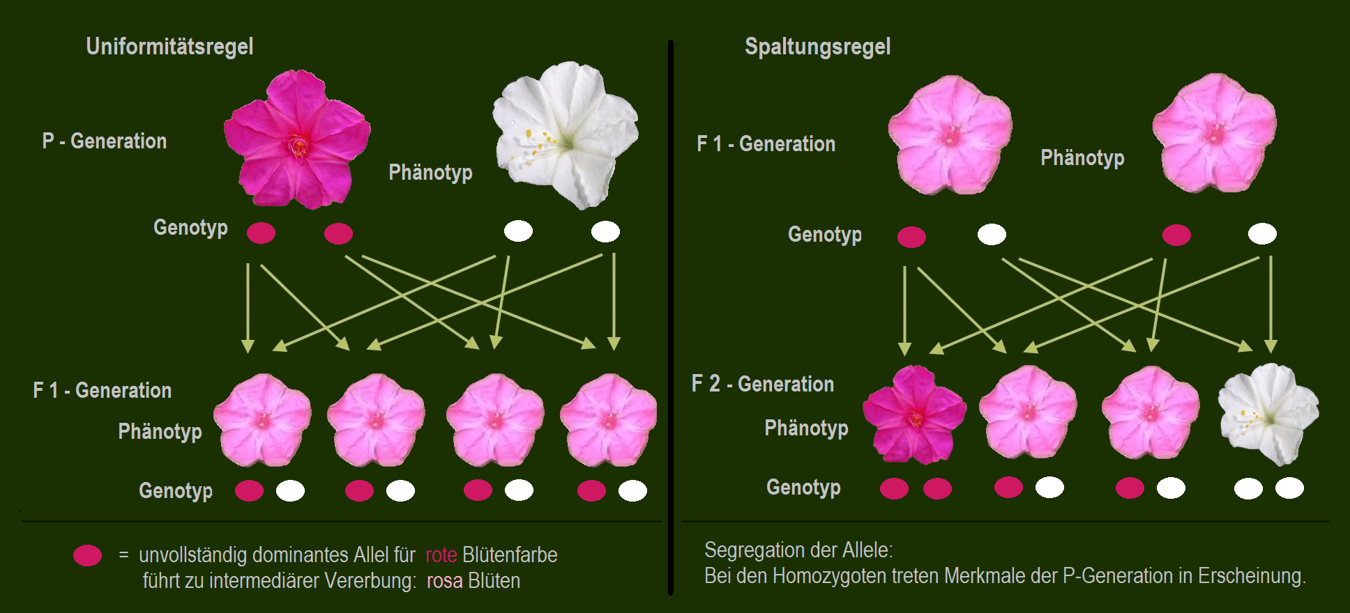 Intermediäre Vererbung